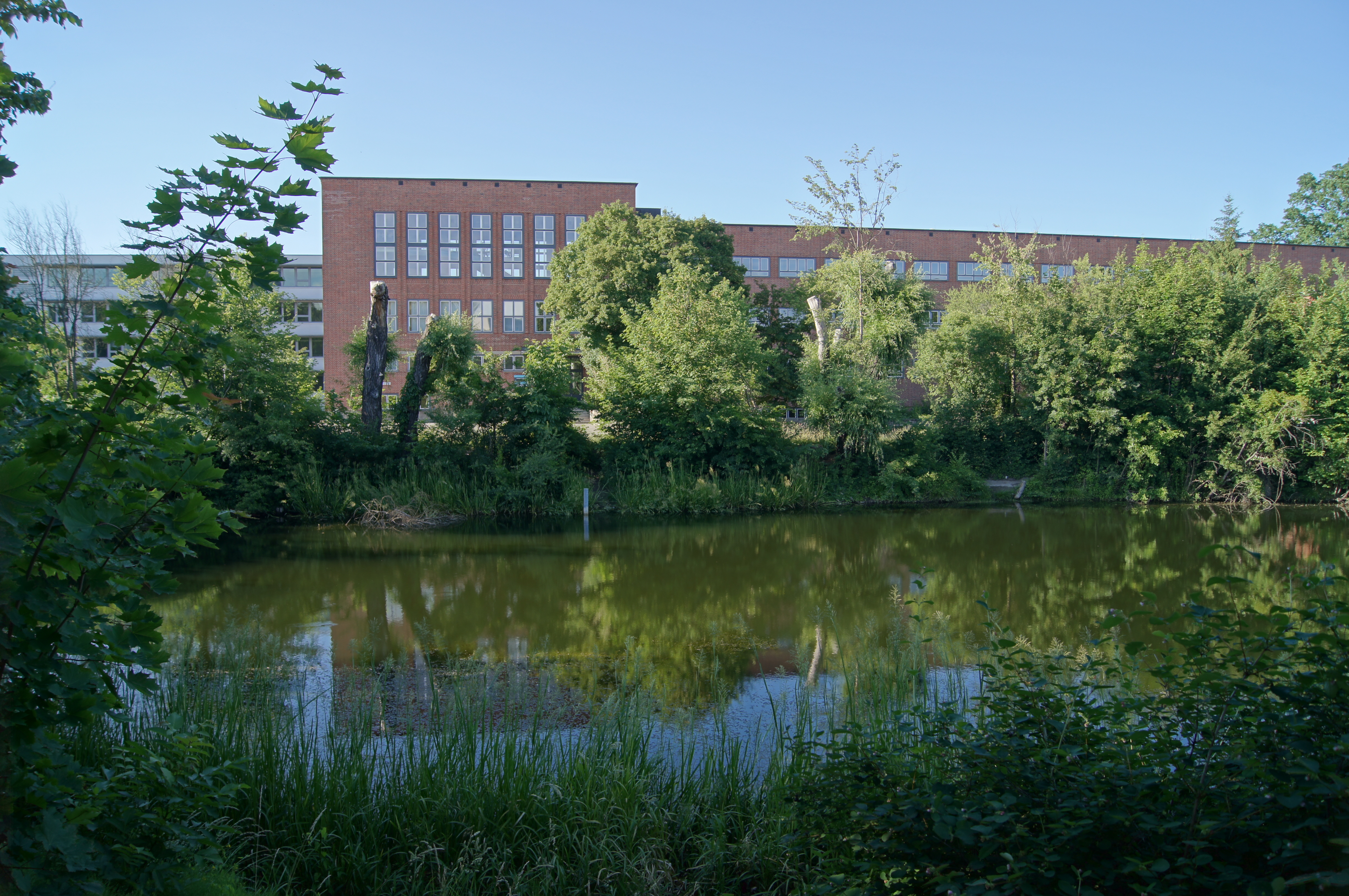 Puschkinteich Frankfurt (Oder), Deutschland